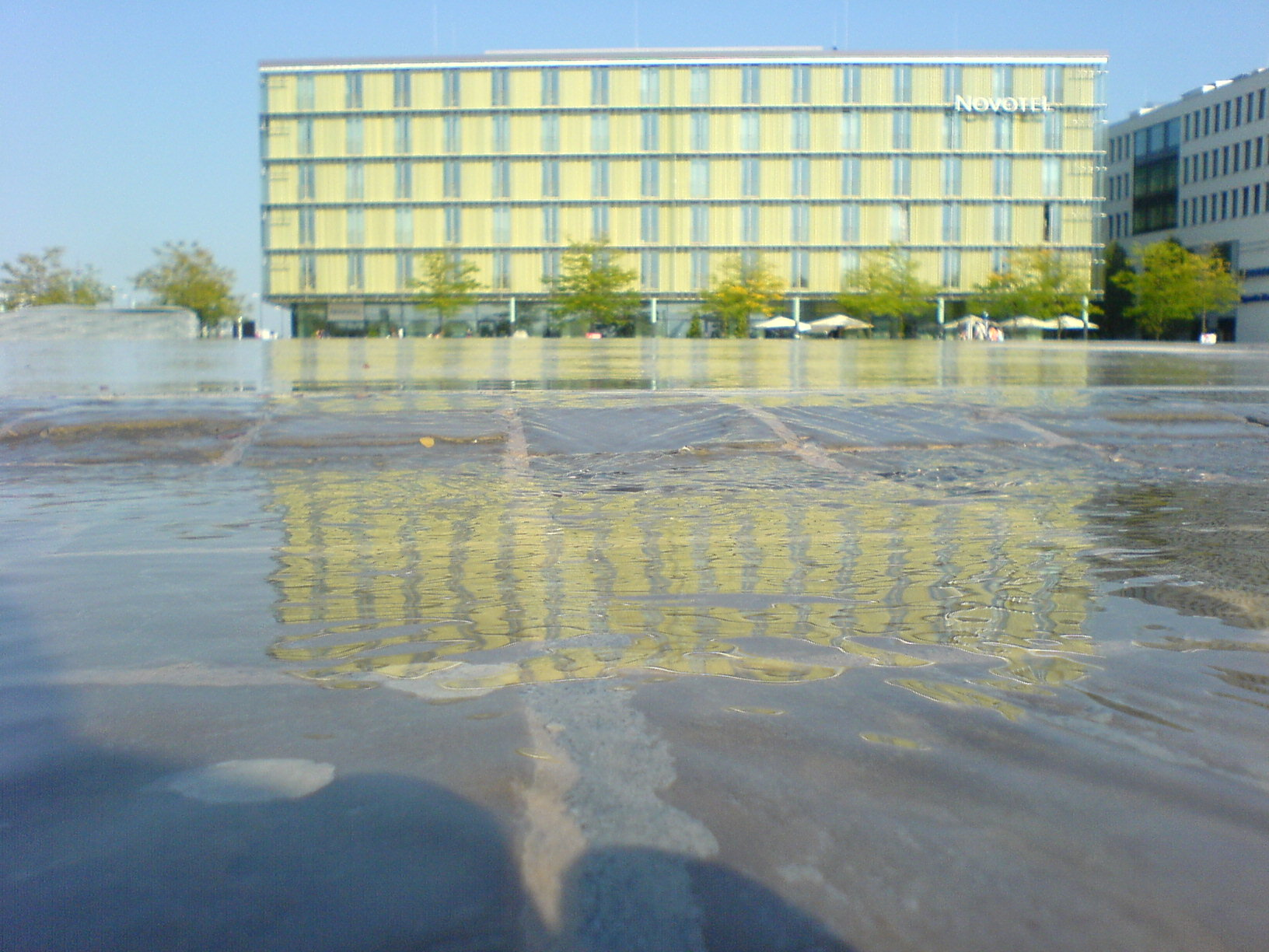 Brunnen (Karin Sander, 2003) auf dem Willy-Brandt-Platz (München-Riem), Teilansicht. Im Hintergrund Hotel Dorint Novotel.